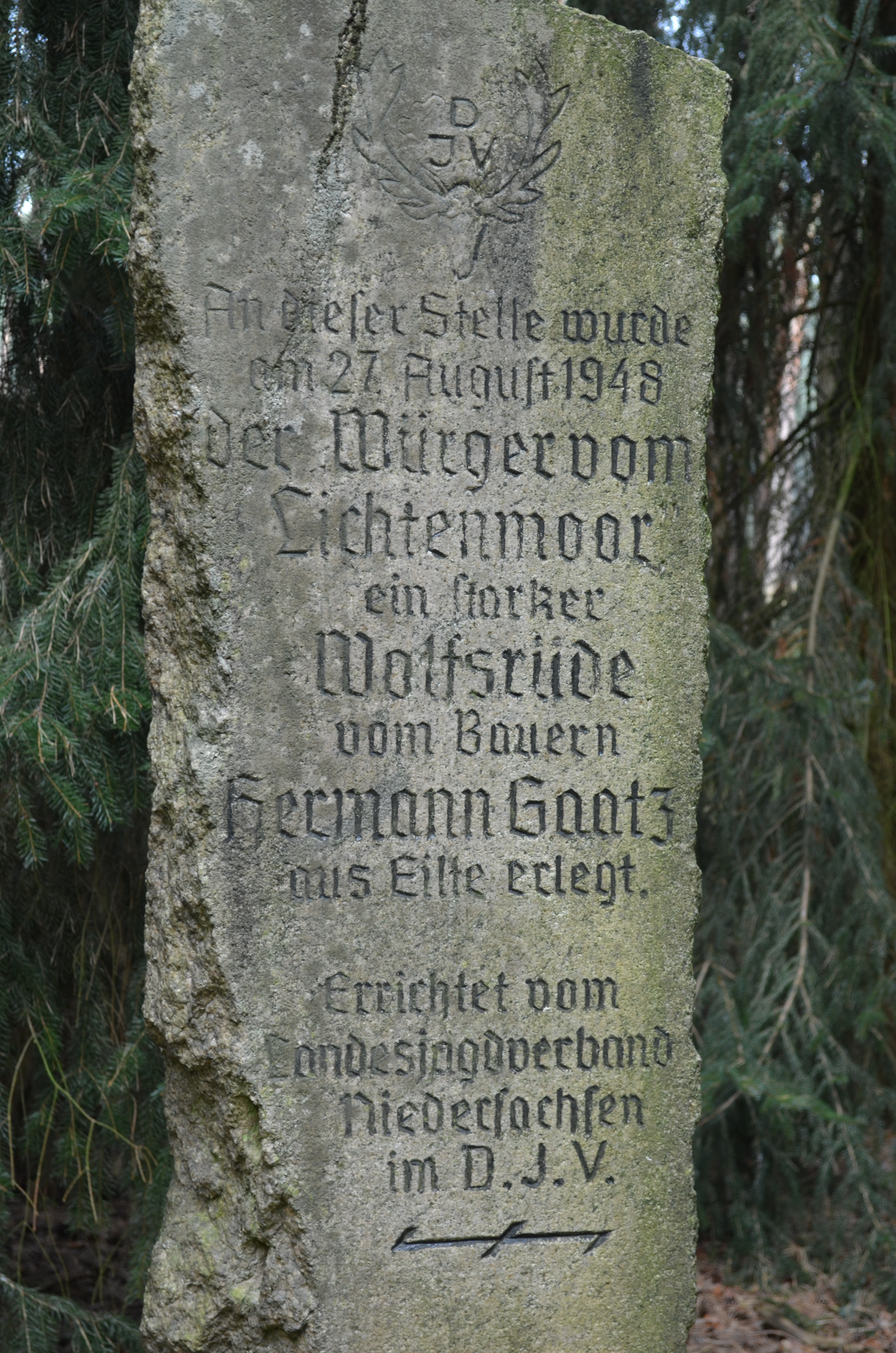 Inschrift des Wolfsteins in der Schotenheide bei Ahlden (Aller)